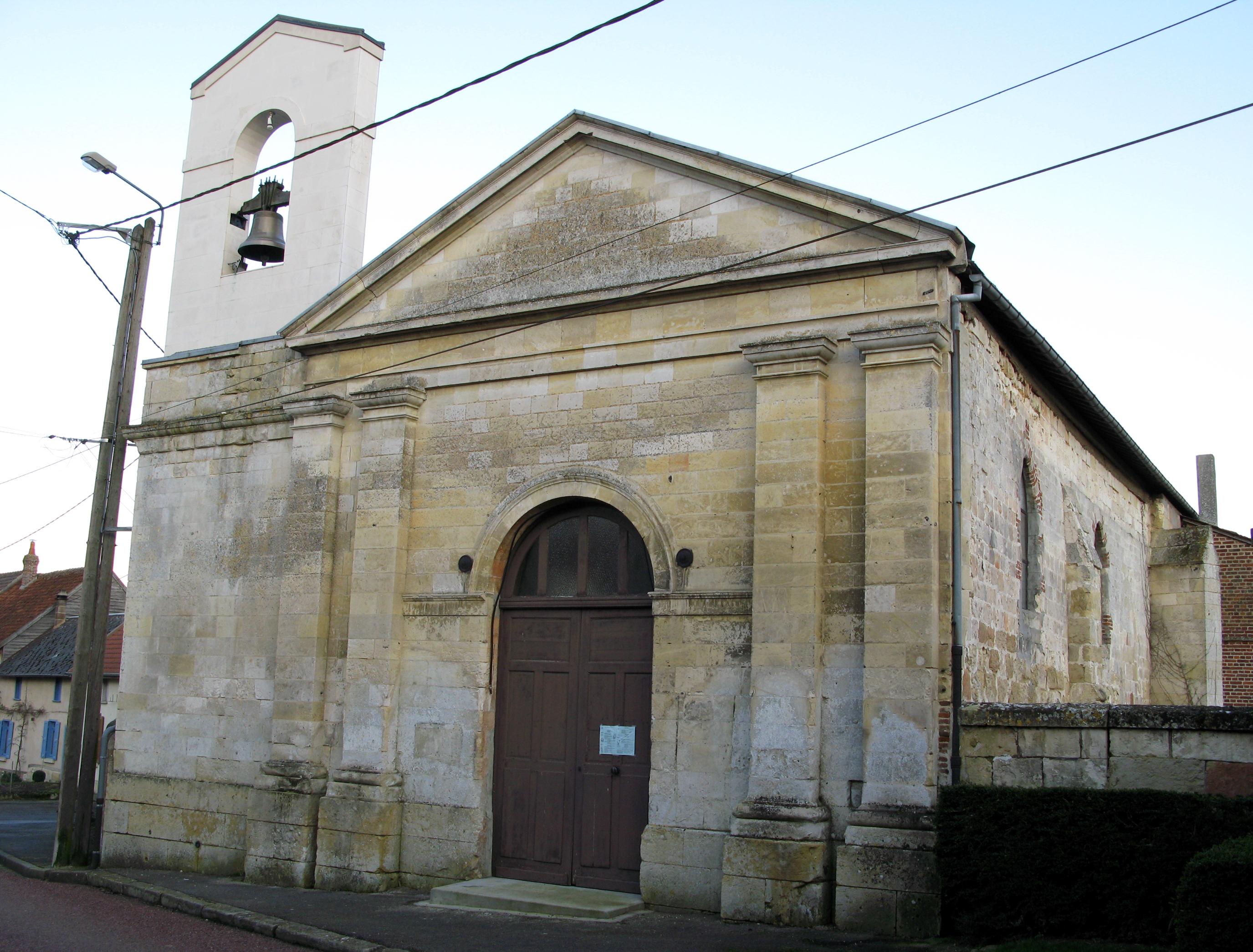 La Faloise (Somme, France) - La façade de l'église. . .